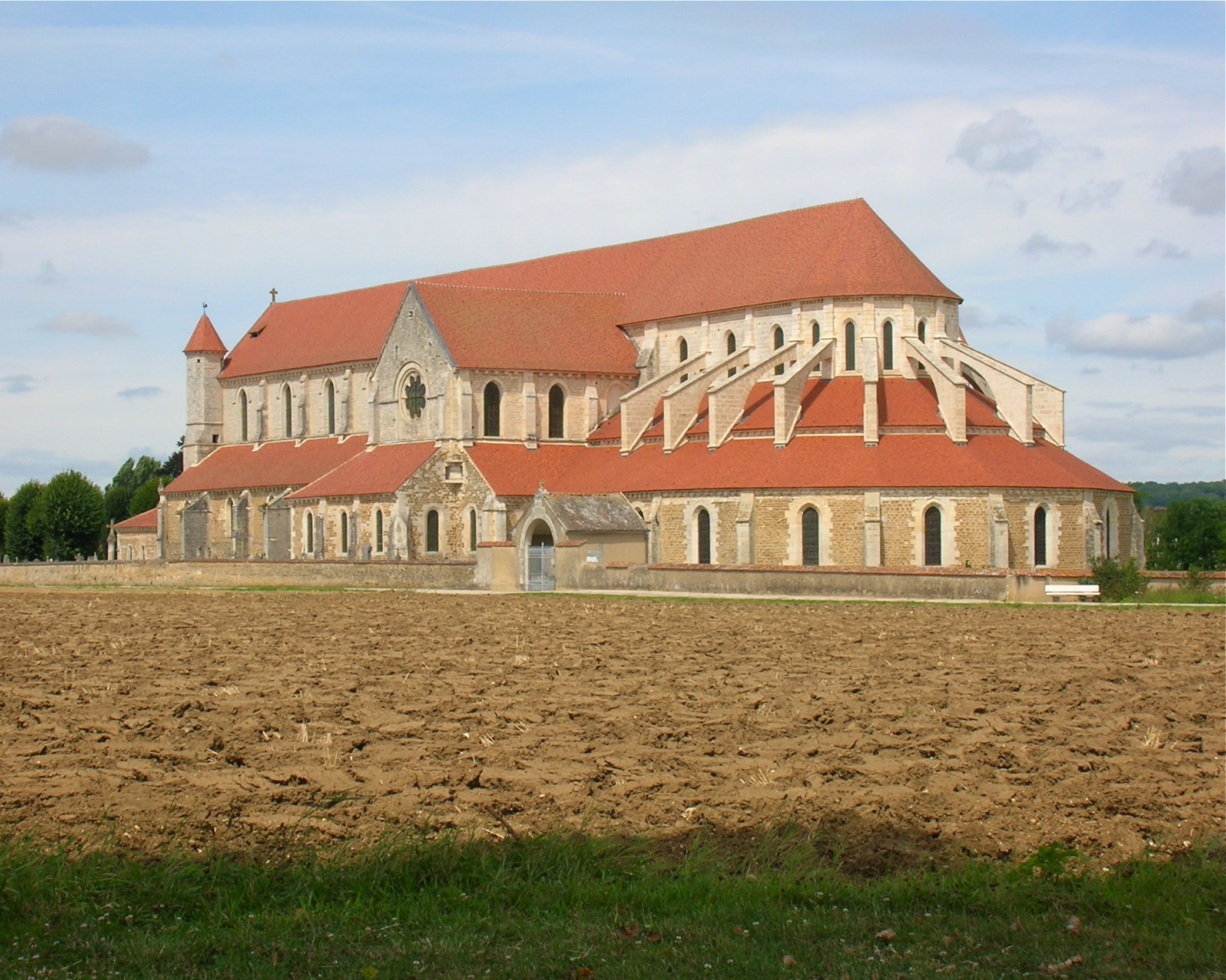 Abbaye cistercienne de Pontigny dans l'Yonne